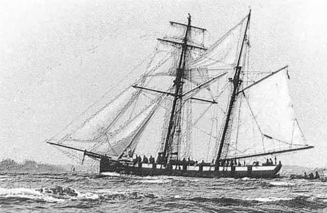 Jean-Claude 25 nov 2004 à 18:50 (CET) Photo personnelle retouchée de la goëlette "La Recouvrance" Traitement sous Photoshop, façon dessin. Original : photo Noir & Blanc, prise pendant la Semaine du Golfe (Morbihan), juin 2003.